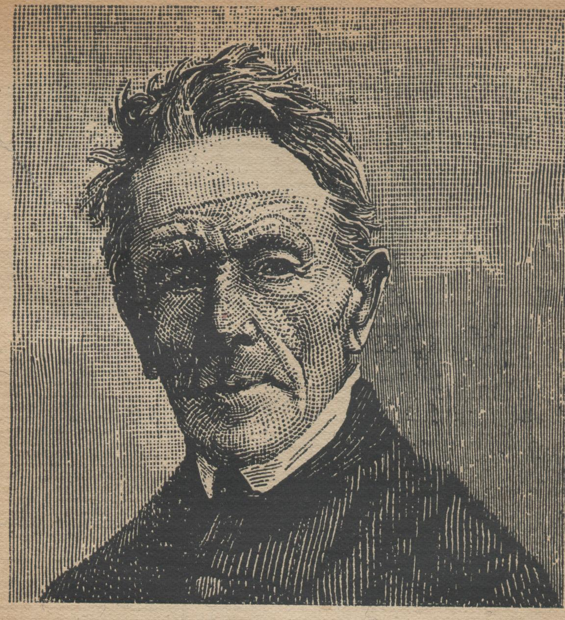 Dr. Magnus Jocham, Buchautor, Priester und Theologieprofessor, Freising, Bayern